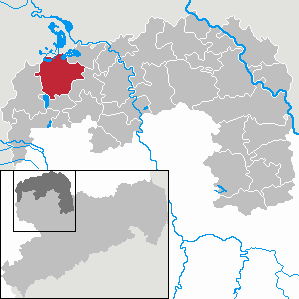 Delitzsch in Saxony - Landkreis Nordsachsen